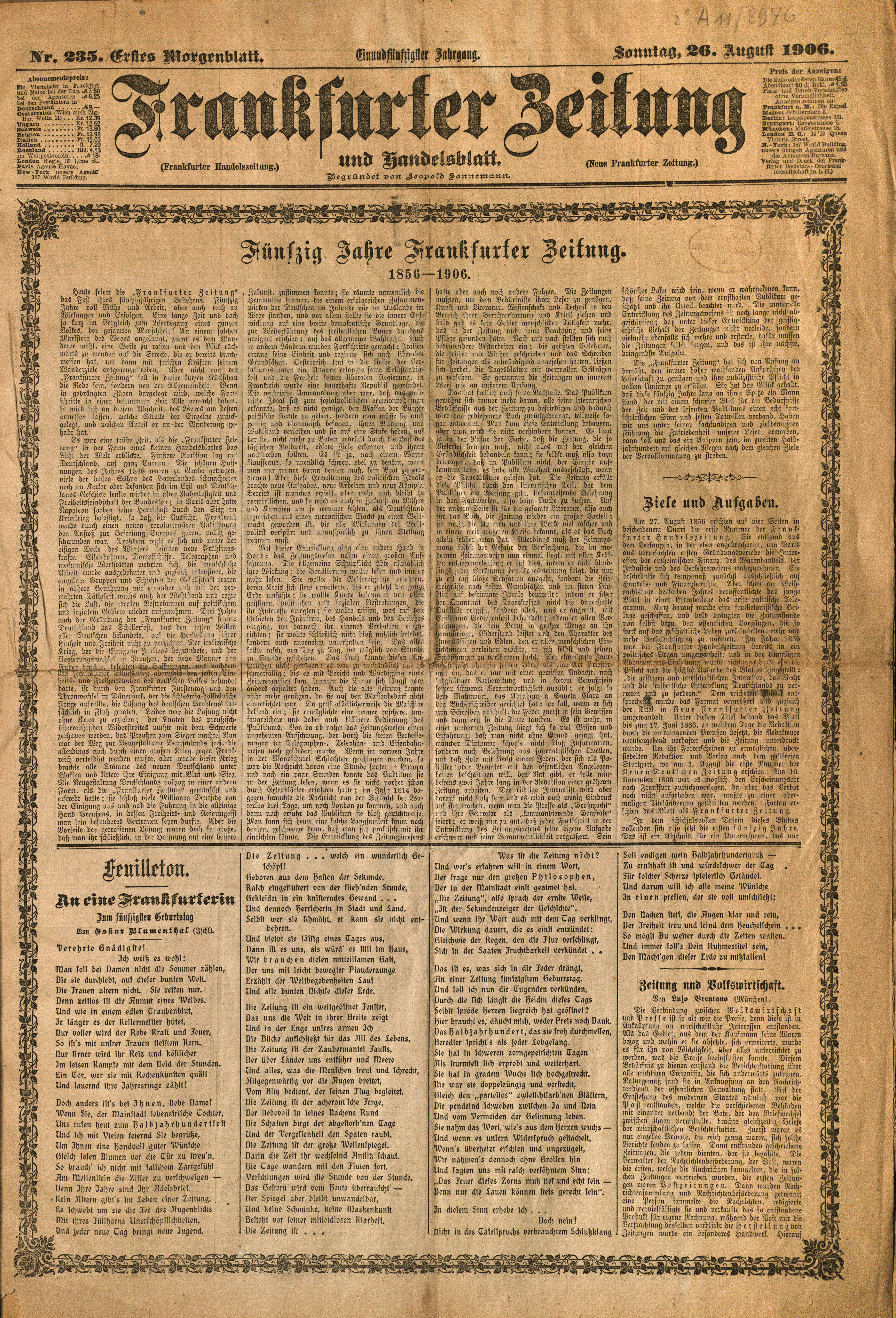 Erste Seite der Jubiläumsausgabe "50 Jahre Frankfurter Zeitung", veröffentlicht am Sonntag, den 26. August 1906